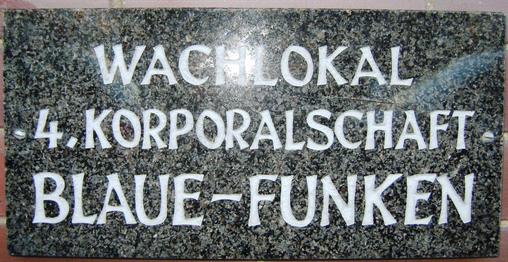 Typisches Wachlokalschild im rheinischen Eschweiler (siehe Eschweiler Karneval)